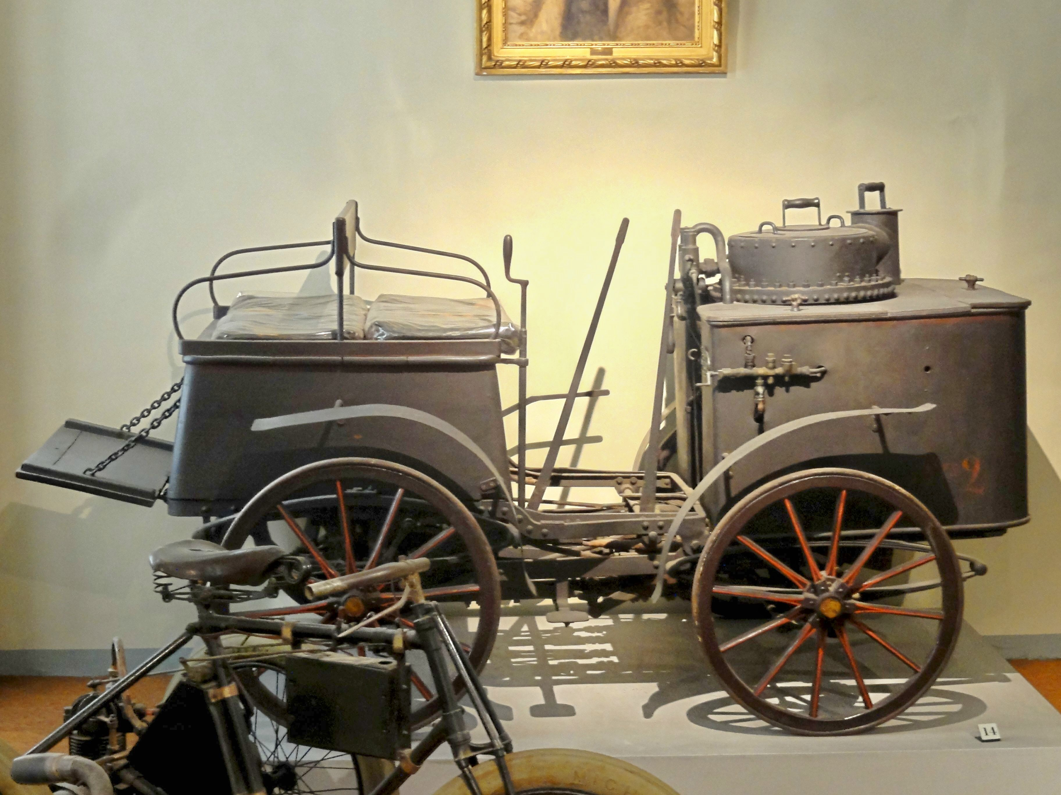 Voiture automobile à vapeur De Dion, Bouton & Trépardoux "Dog Cart de route" (1885), pièce d'exposition n° 14.